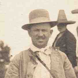 Capitán Alfred W. Lewis en México durante la Revolución Mexicana